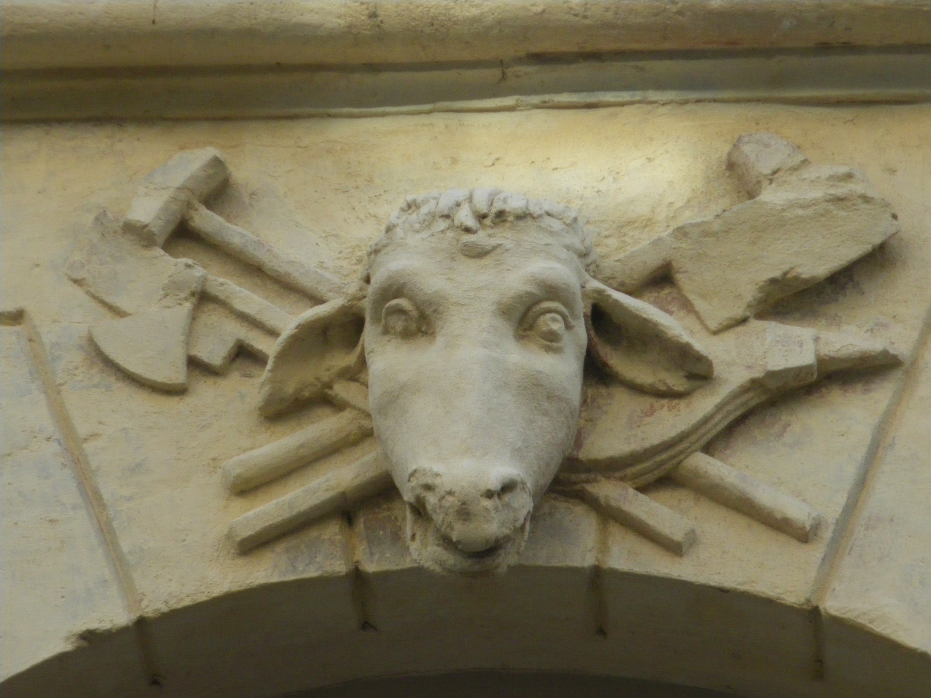 détail de la facade du 22 rue Vieux Sextier à Avignon, France